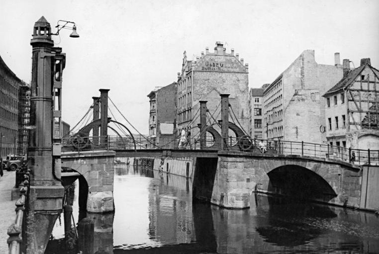 Berlin, Jungfernbrücke Zentralbild Archiv bgm-tie 18.8.1967 Berlins älteste Brück in junger Umgebung: Die Jungfernbrücke - sie wurde 1798 erbaut und ist die älteste erhaltene Brücke in unserer Hauptstadt - hat im Laufe der Zeit schon viel gesehen. Sie ist auch Zeuge dafür, wie